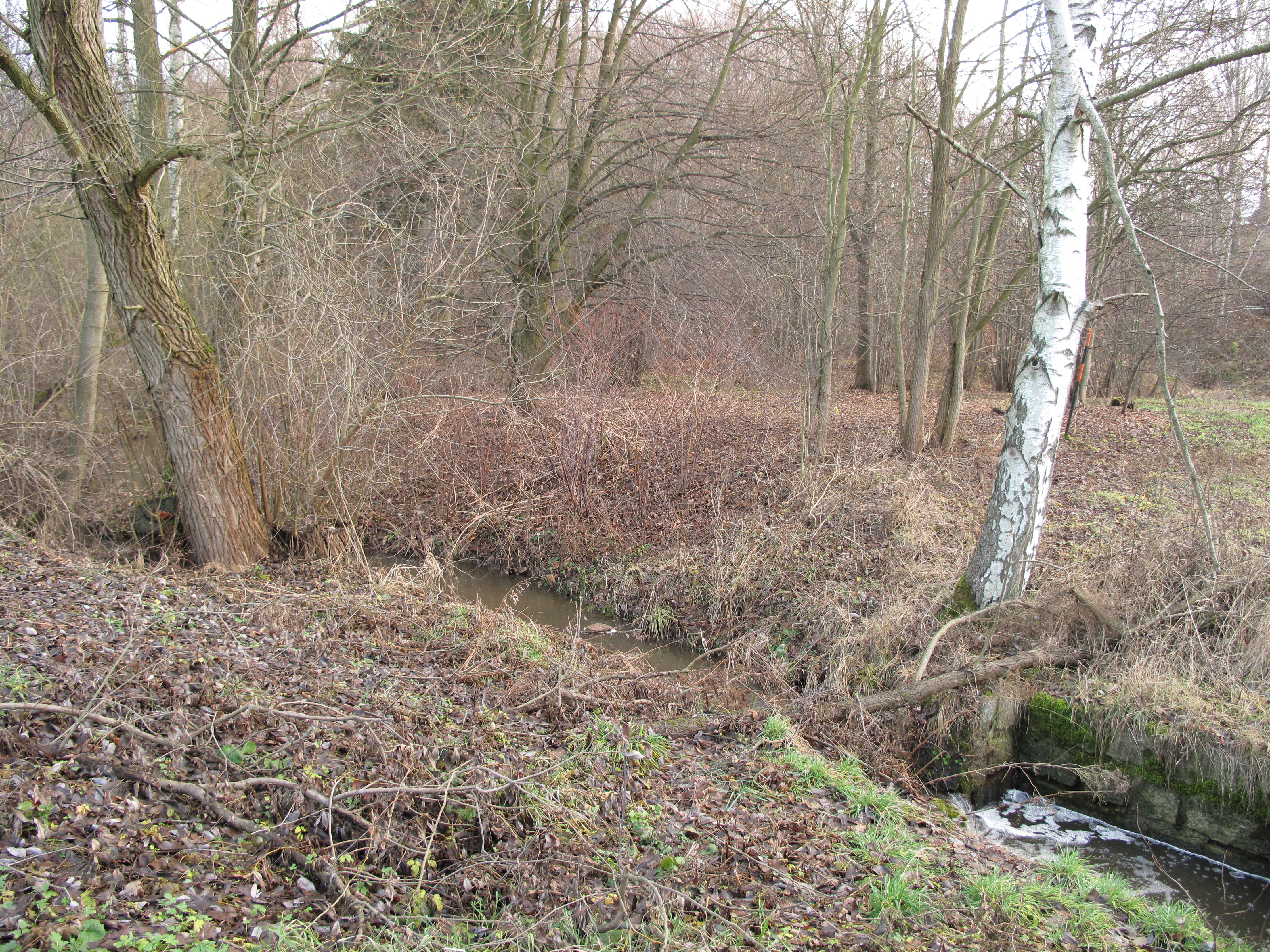 Železný potok v Jablonném v Podještědí.